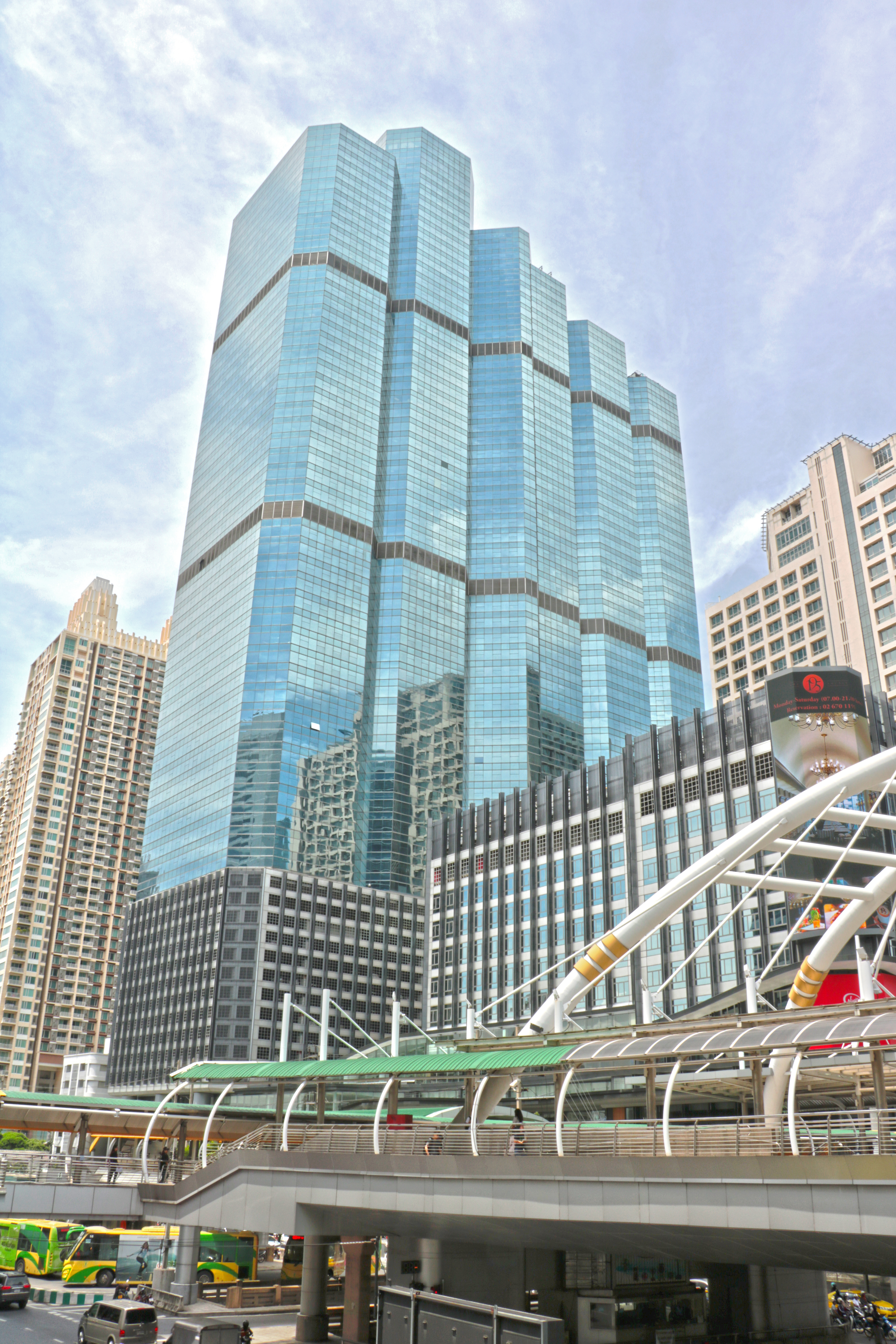 Empire Tower is one of the symbol Finalcial district-Building at Sathorn, Bangkok.